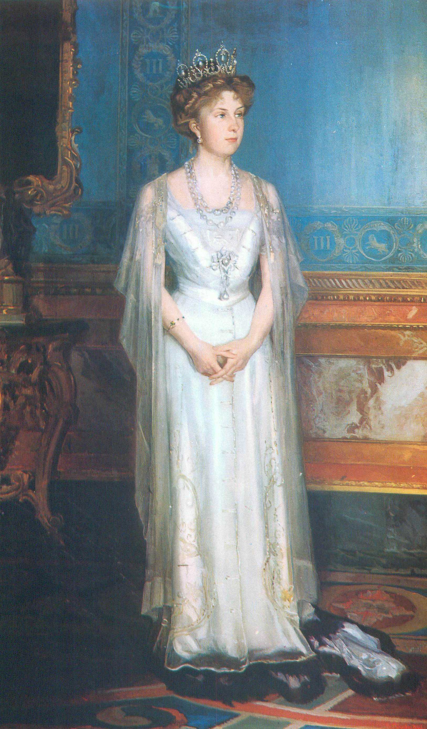 Retrato de la reina Victoria Eugenia de Battenberg (1887-1969), esposa del rey Alfonso XIII de España.